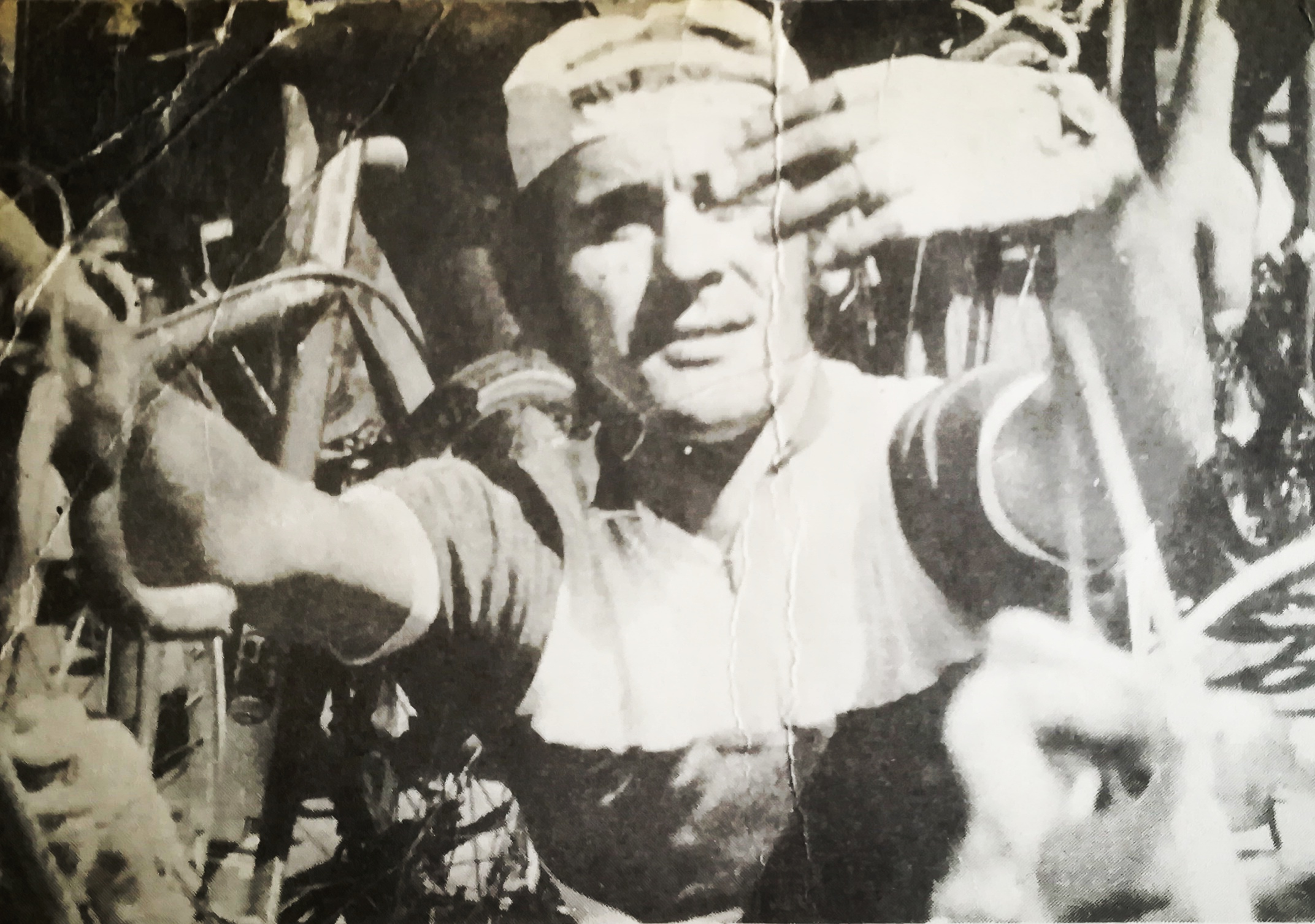 Ryszard Szurkowski, Barcelona 1973 IMŚ w kolarstwie.